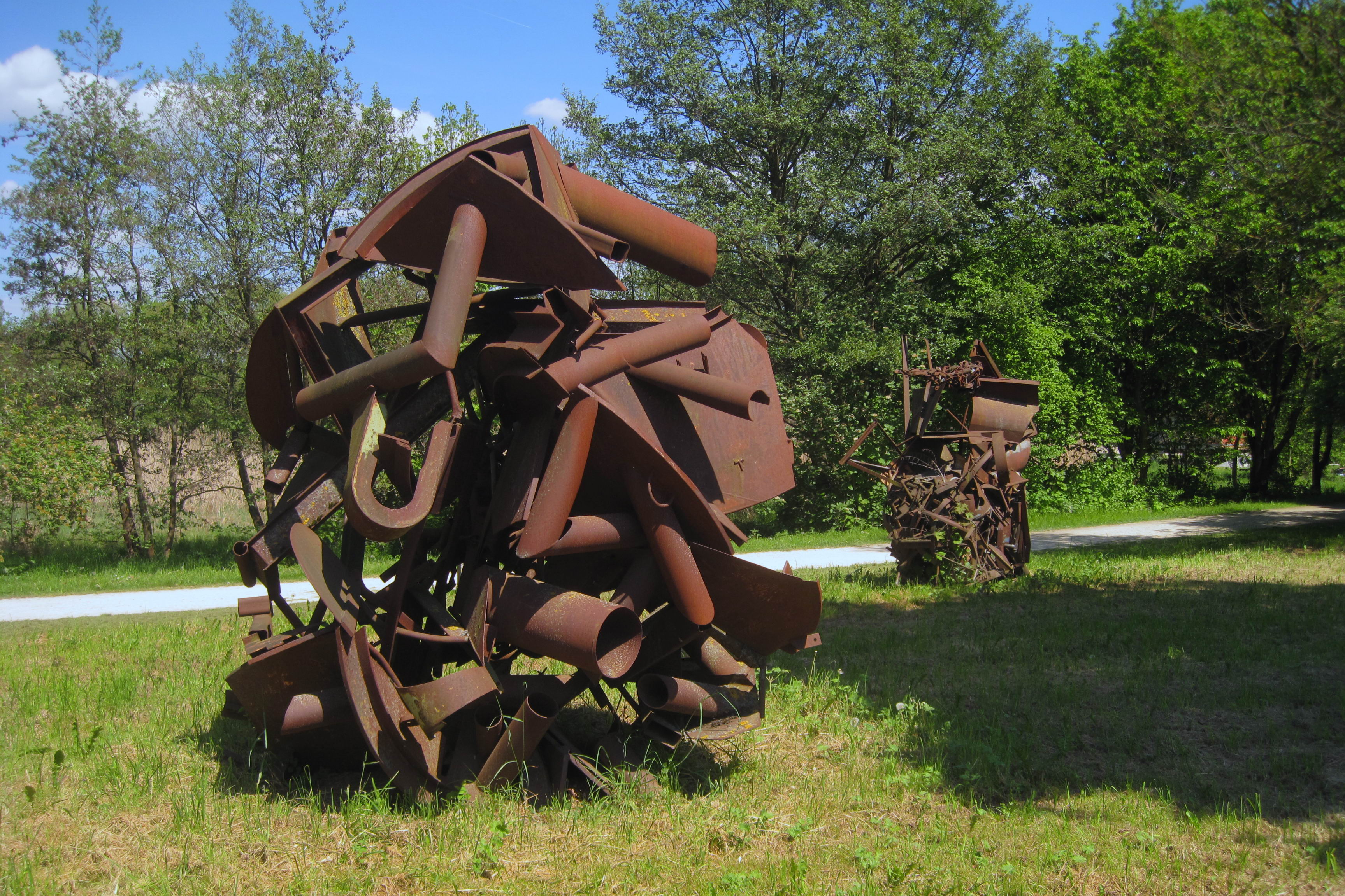 Amberger Skulpturenweg in Amberg. Skulptur ohne Titel aus Eisenschrott, geschweißt, gerostet. Künstler: Erwin Regler aus Verdun (Kanada).